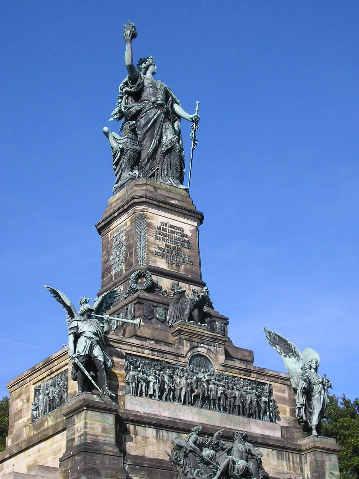 Niederwald Memorial near Rüdesheim/ Germany